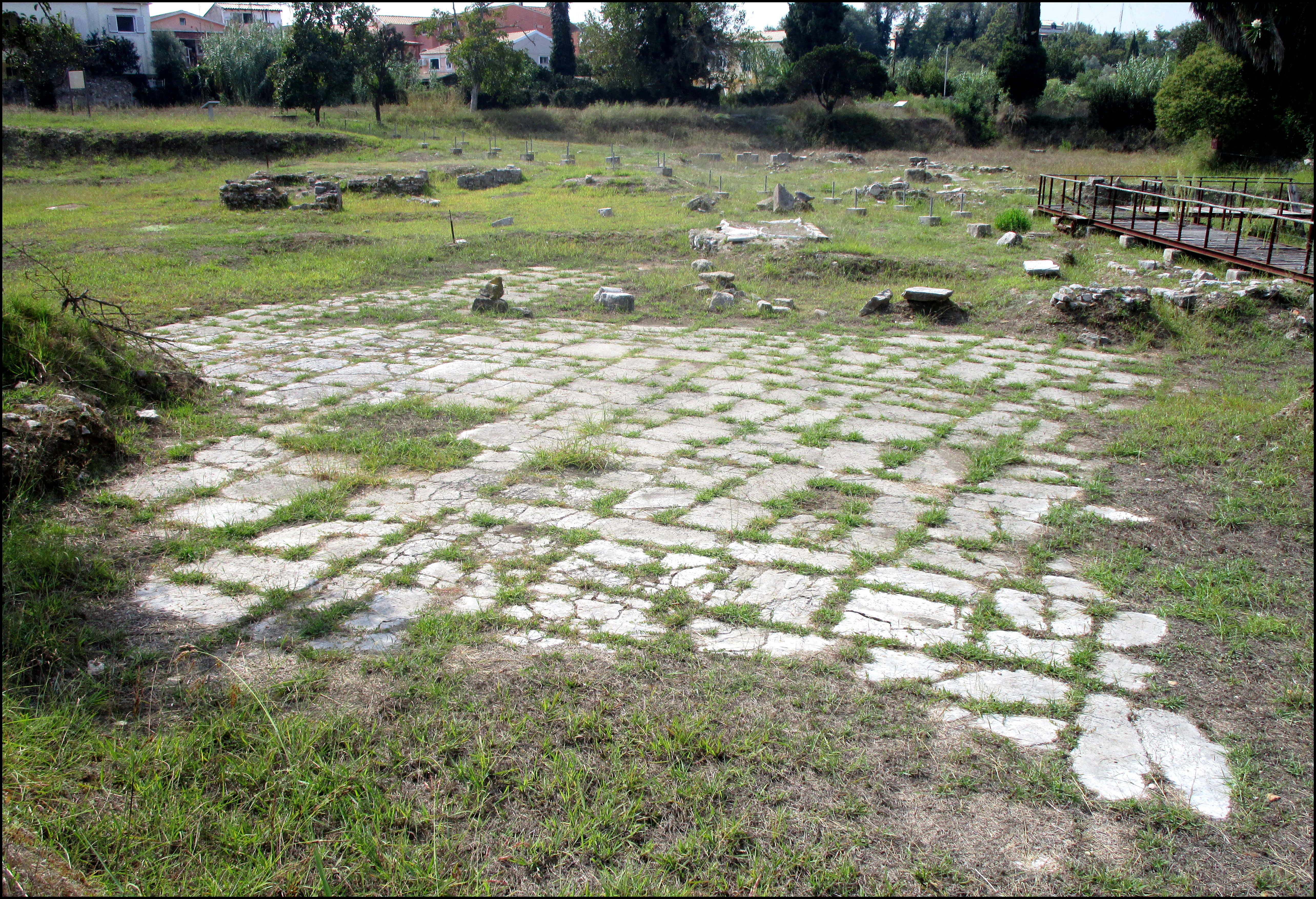 Αγορά Aρχαίας πόλης της Κέρκυρας«άγνωστο»